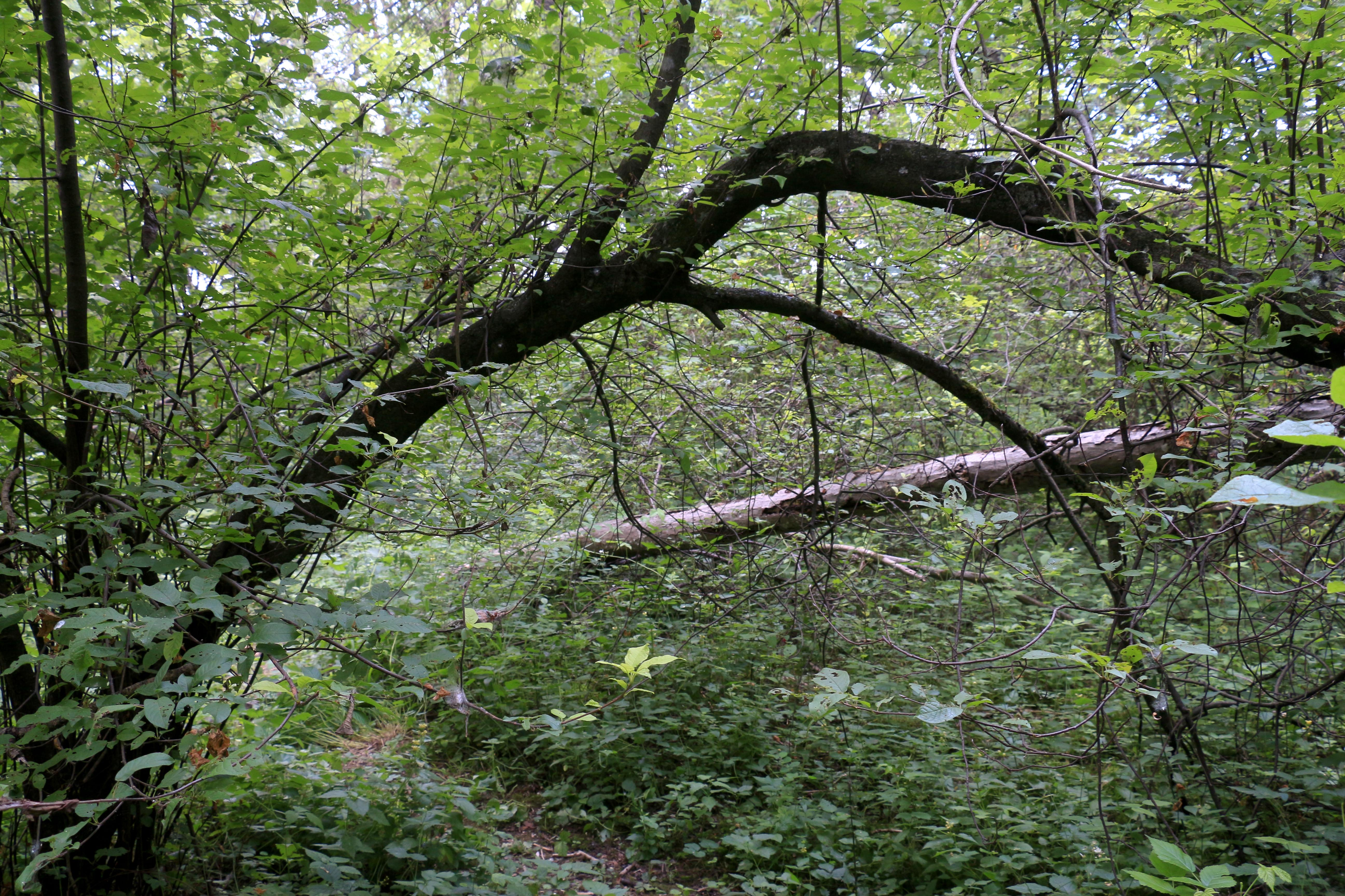 Die Itzlinger Au im Norden der Stadt Salzburg This media shows the Geschützter Landschaftsteil in Salzburg with the ID GLT00108.